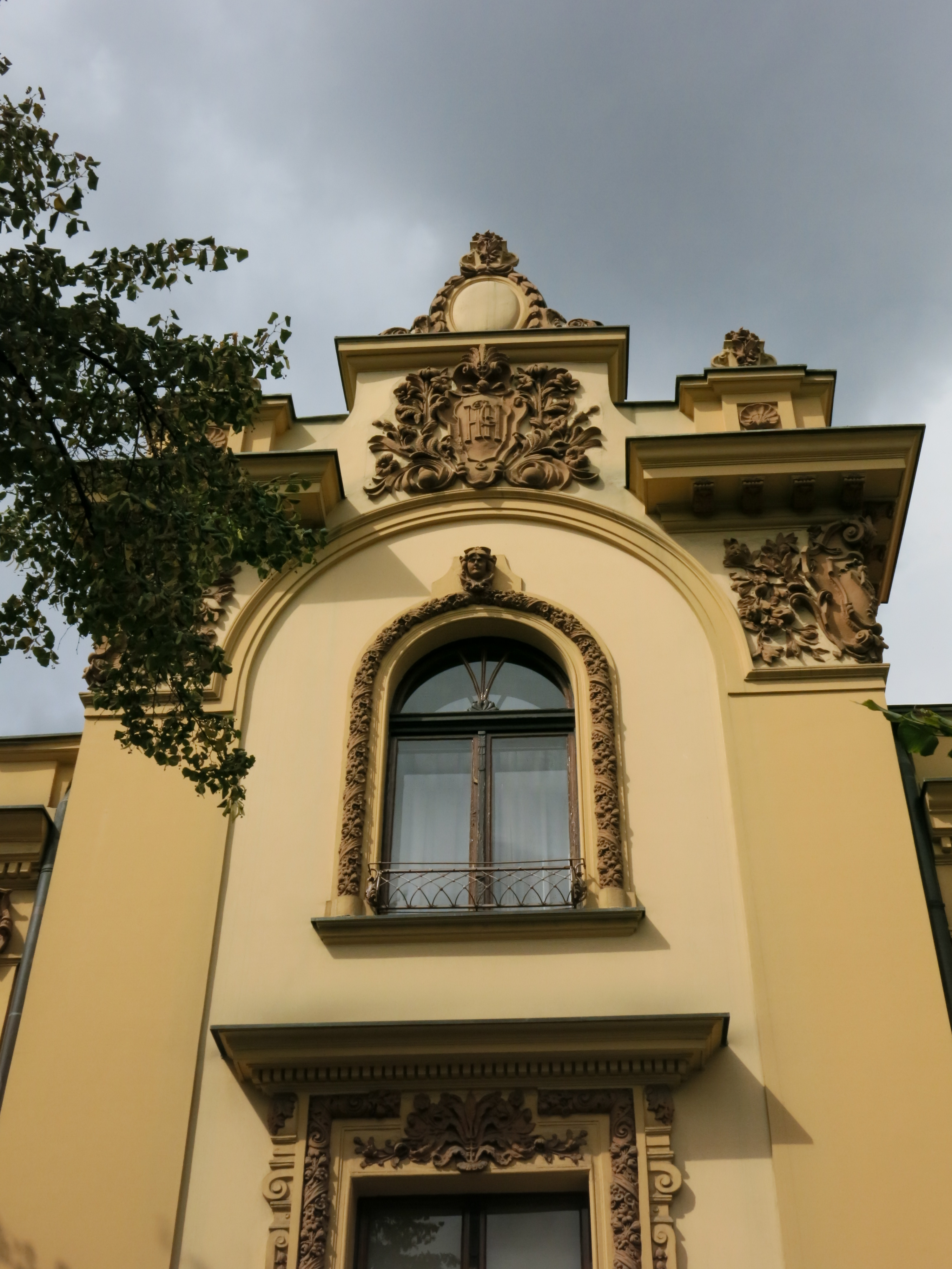 Породична кућа Николе Несторовића